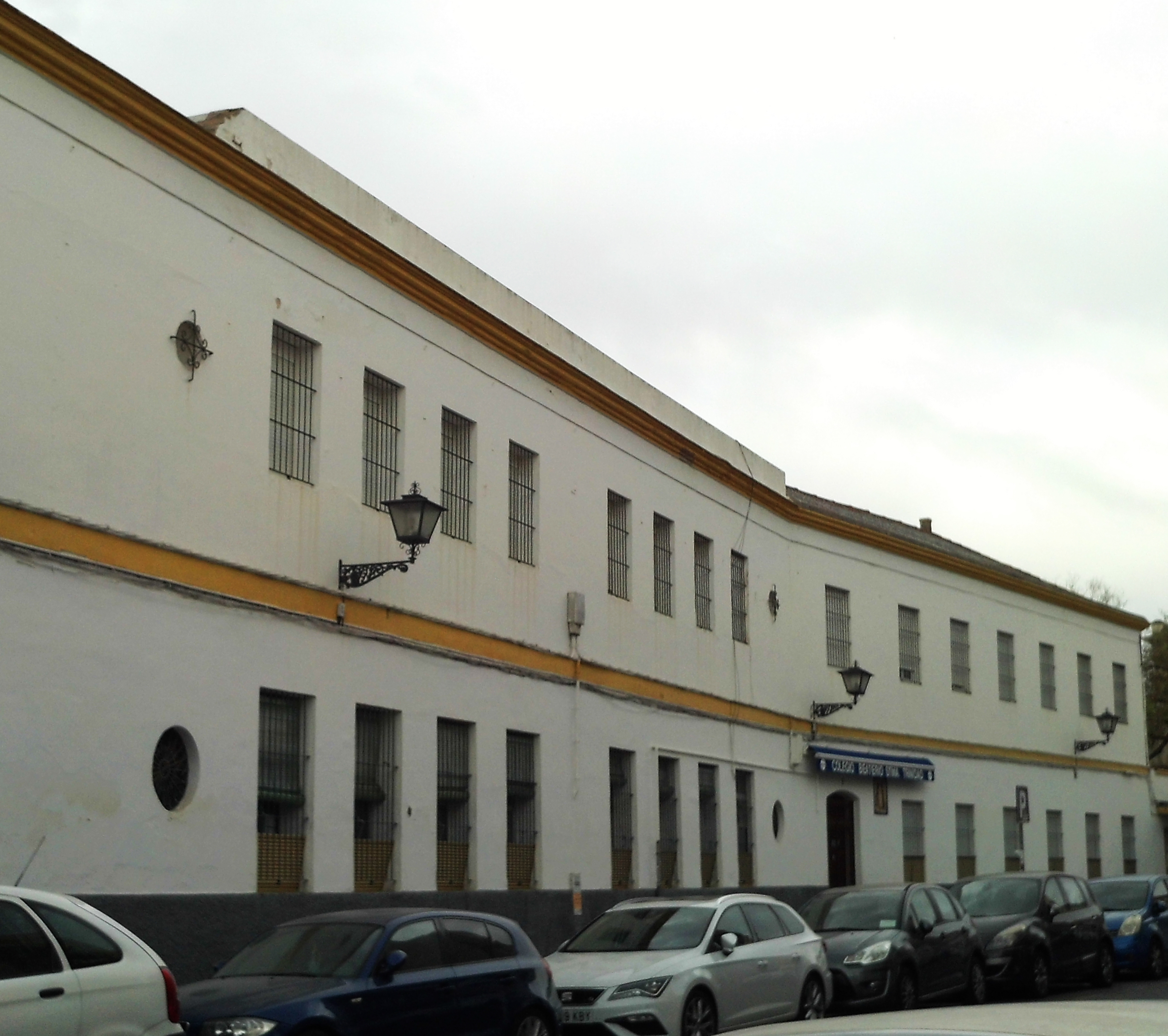 Colegio Beaterío Santísima Trinidad. Sevilla, Andalucía, España.